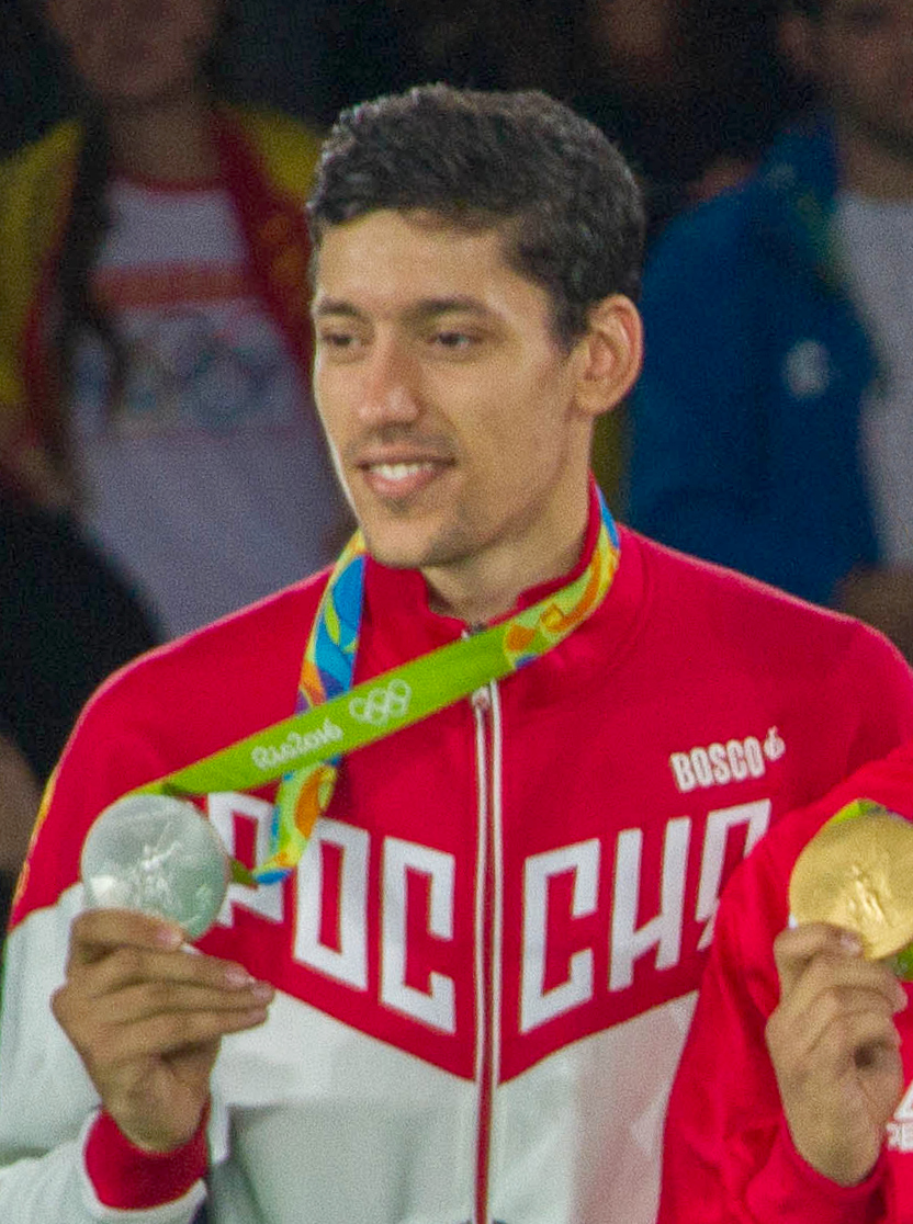 Rio 2016